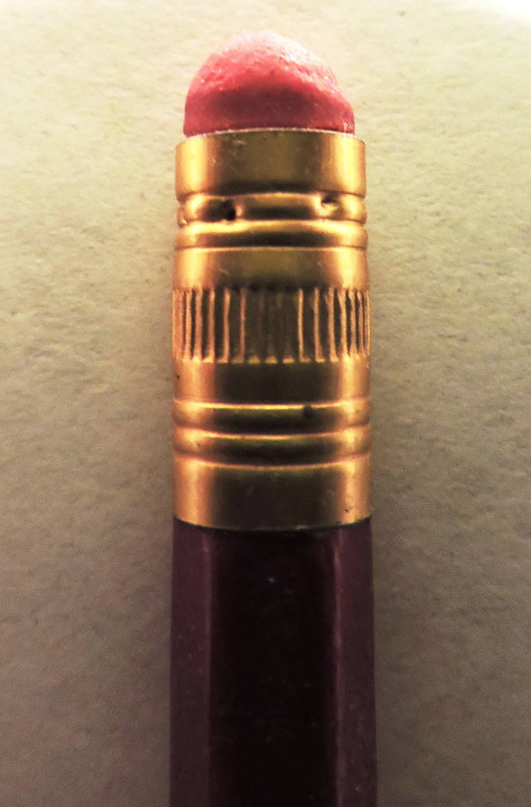 Ластик на карандаше (макросъёмка)